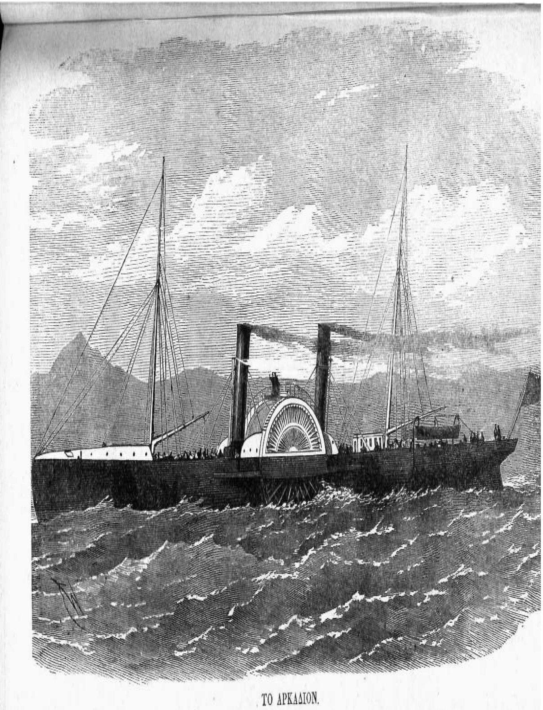 Griechisches Dampfschiff, 19. Jahrhundert